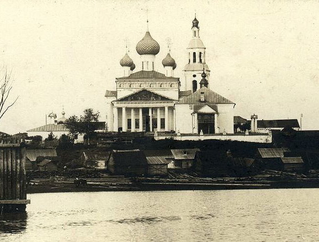 Собор Воскресения Словущего в Бежецке (1720-26)